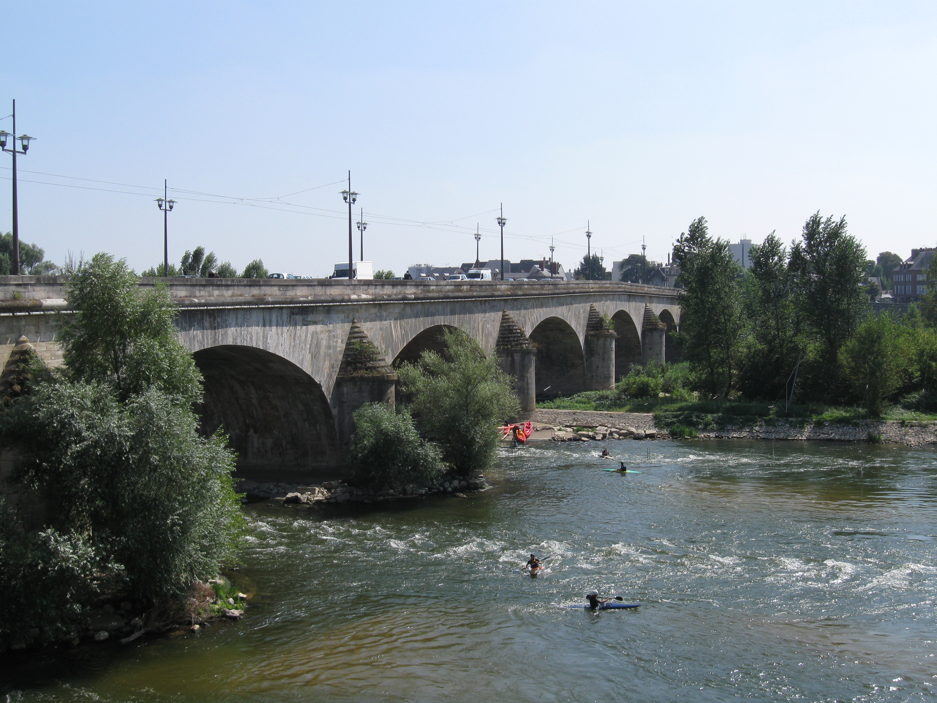 Pont George V, Orléans, Loiret, France